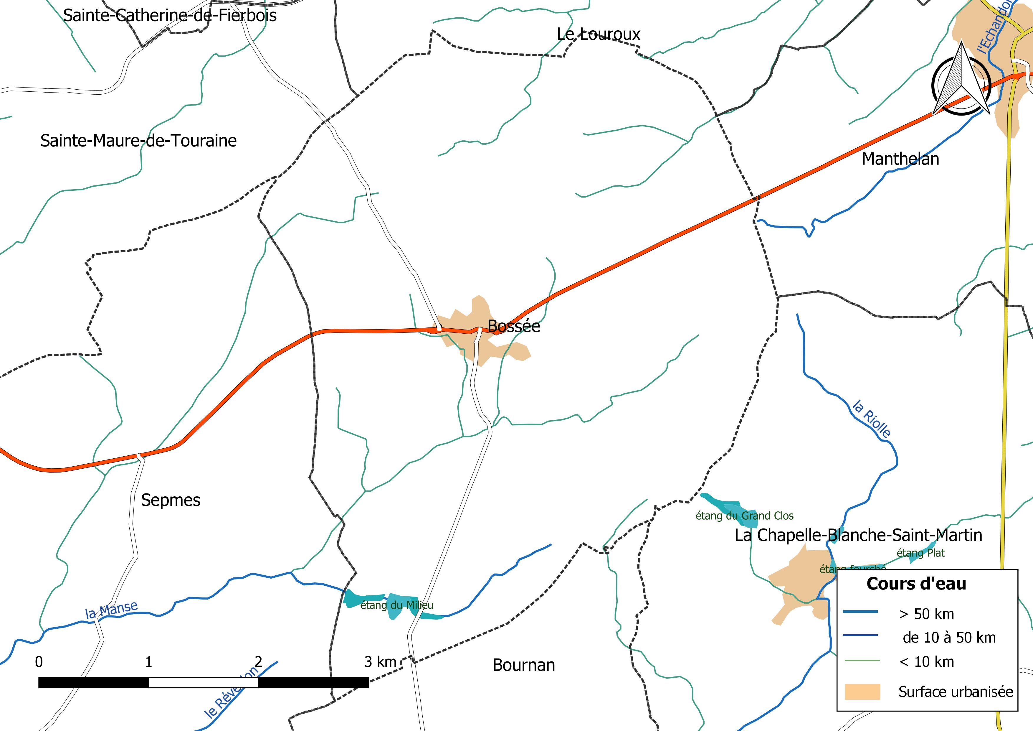 Carte du réseau hydrographique de la commune de Bossée (France).